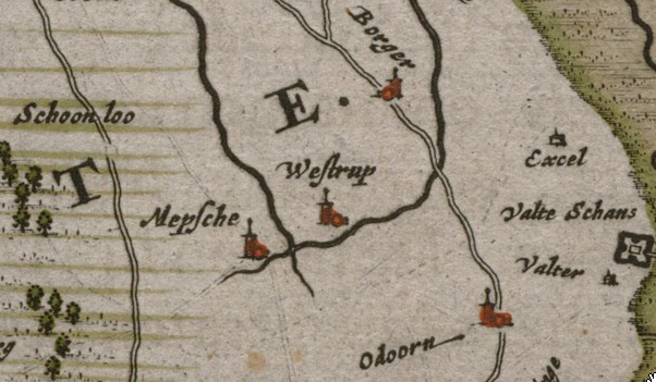 Detail van de kaart van Overijssel (met ook Drenthe) uit Blaeu's Toonneel der Steden